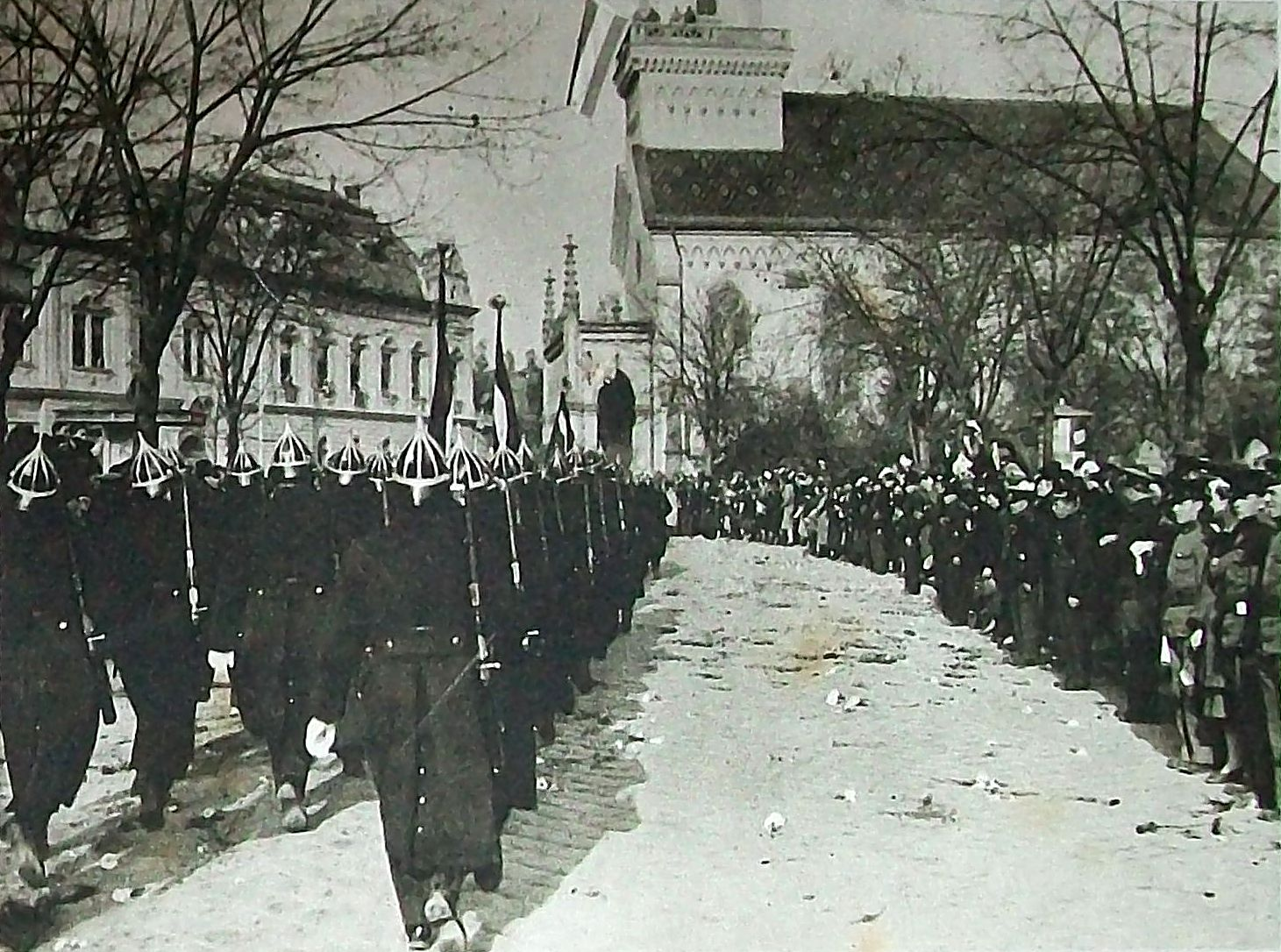 Mussolini and Hitler in Berlin (Hungarian name of the book (Felvidékünk - Honvédségünk / Trianontól-Kassáig), publishers (Vitézi rend Zrinyi csoportjuának kiadása, Budapest, 1939)